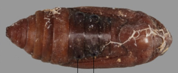 Leucinodes africensis